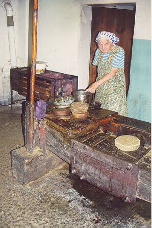 Tökmagsajtolás Csörgőszeren (Szalafő, Őrség). Még a hagyományos fa sajtolóval sajtolják a tökmagolajat, az Őrség jellegzetes ételkiegészítőjét.